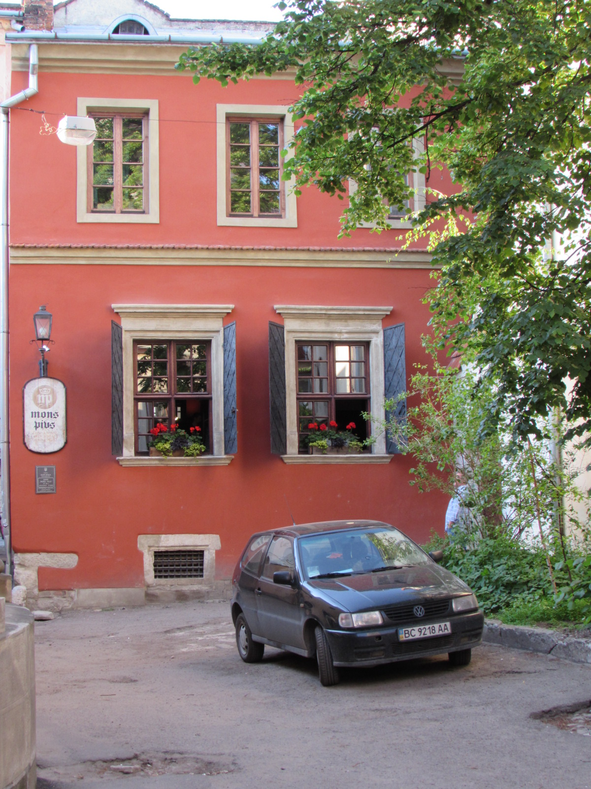 житловий будинок, Львів, Лесі Українки, 14